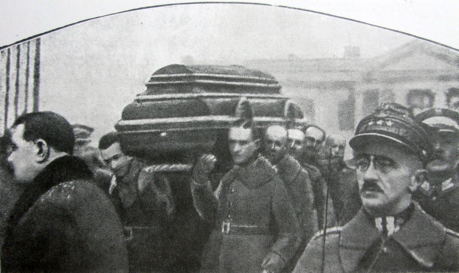 Wyprowadzanie trumny z ciałem prezydenta Gabriela Narutowicza z Belwederu, 19 grudnia 1922